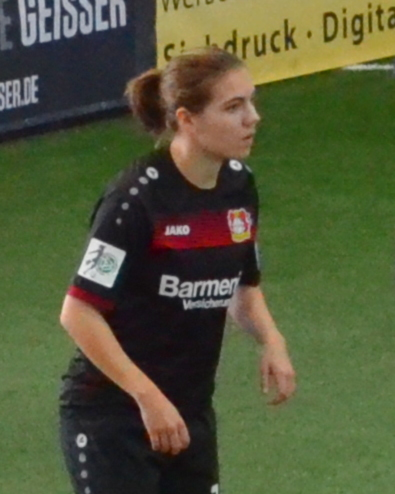 Rieke Dieckmann (Bayer Leverkusen) beim SAP Frauen-FußballCup 2017